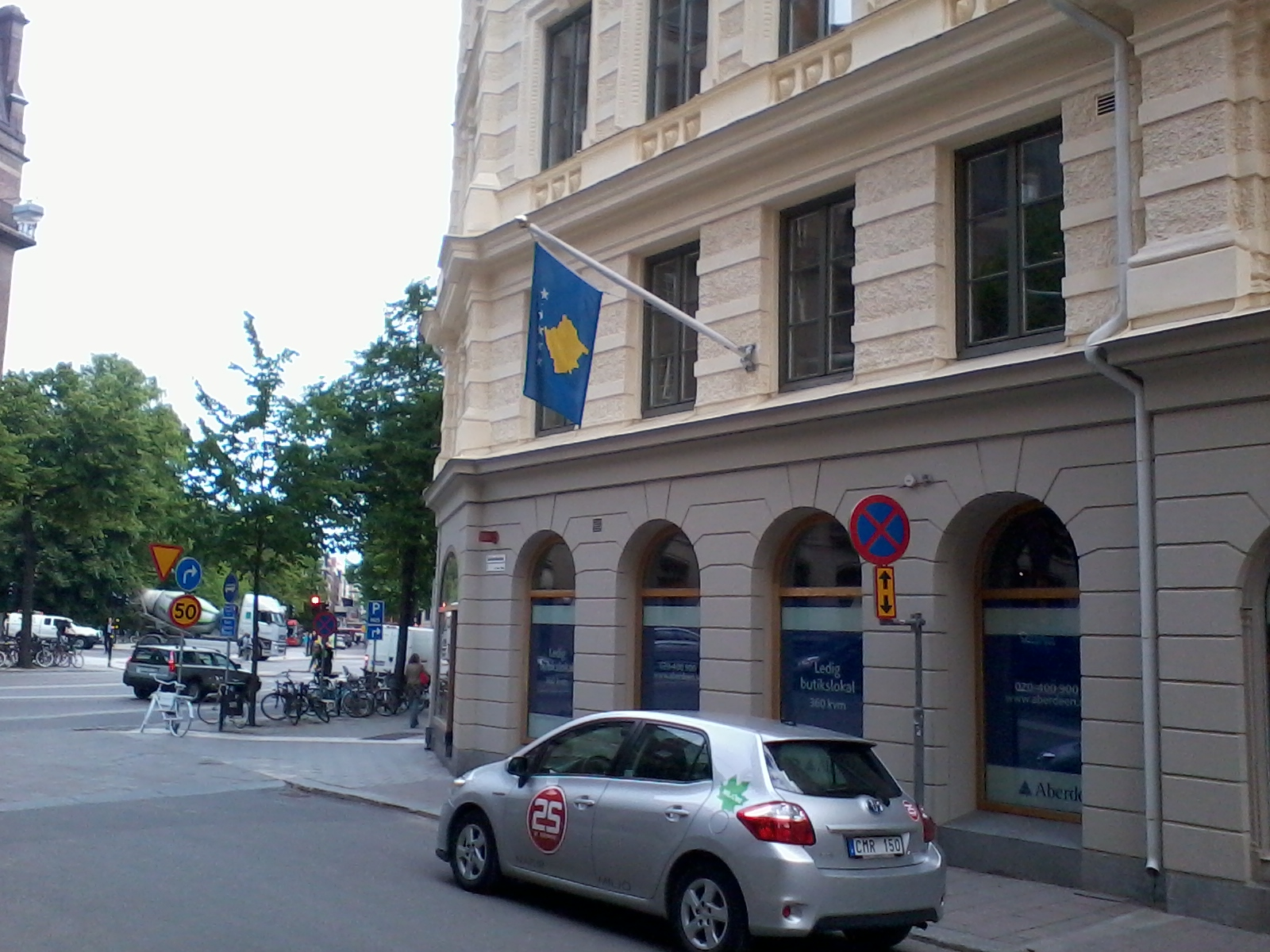 Kosovos ambassad i Stockholm